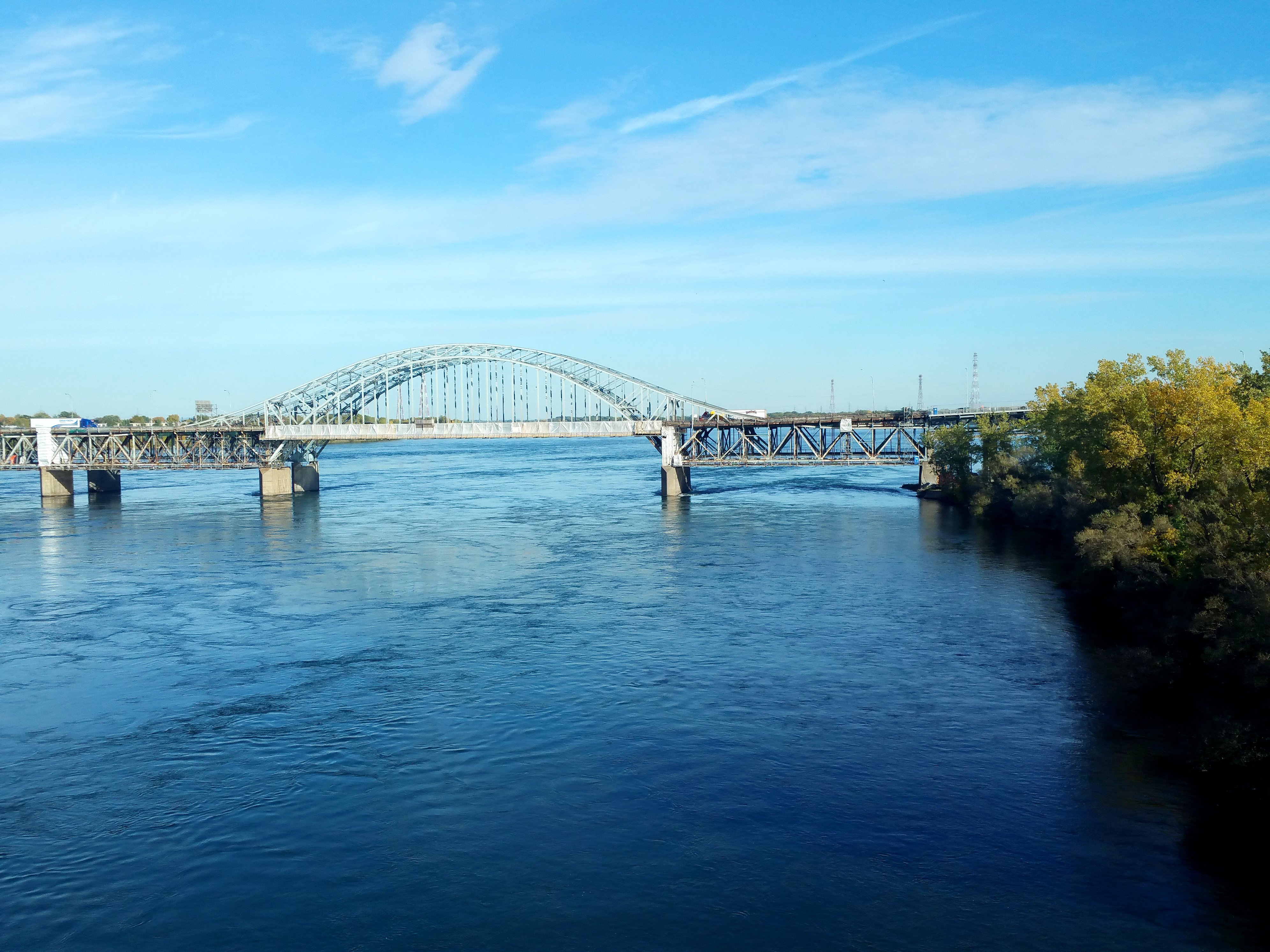 Honoré Mercier Bridge